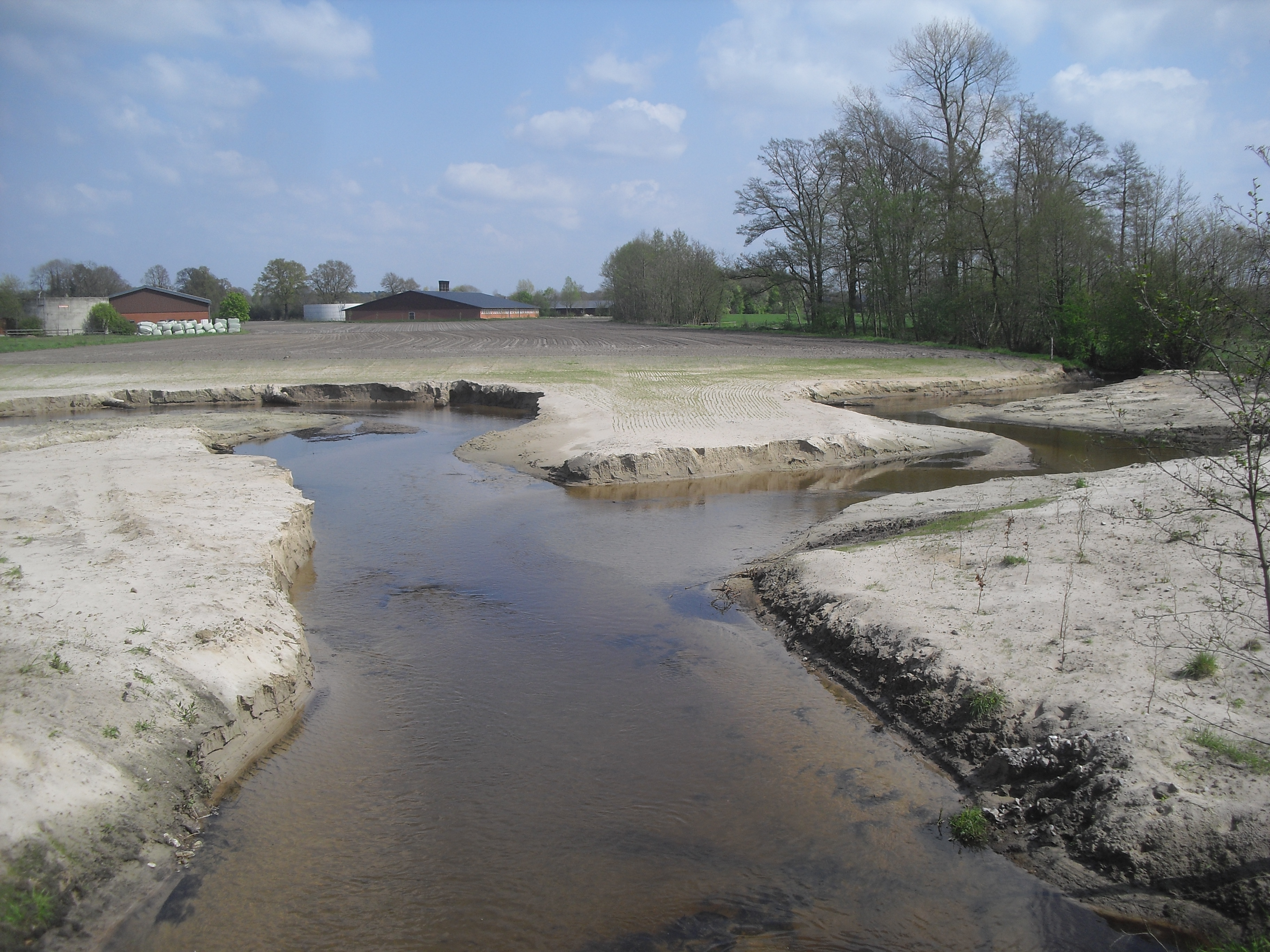 Mündung des Schwarzwasserbachs in die Ems bei Espeln. LSG Untere Senne